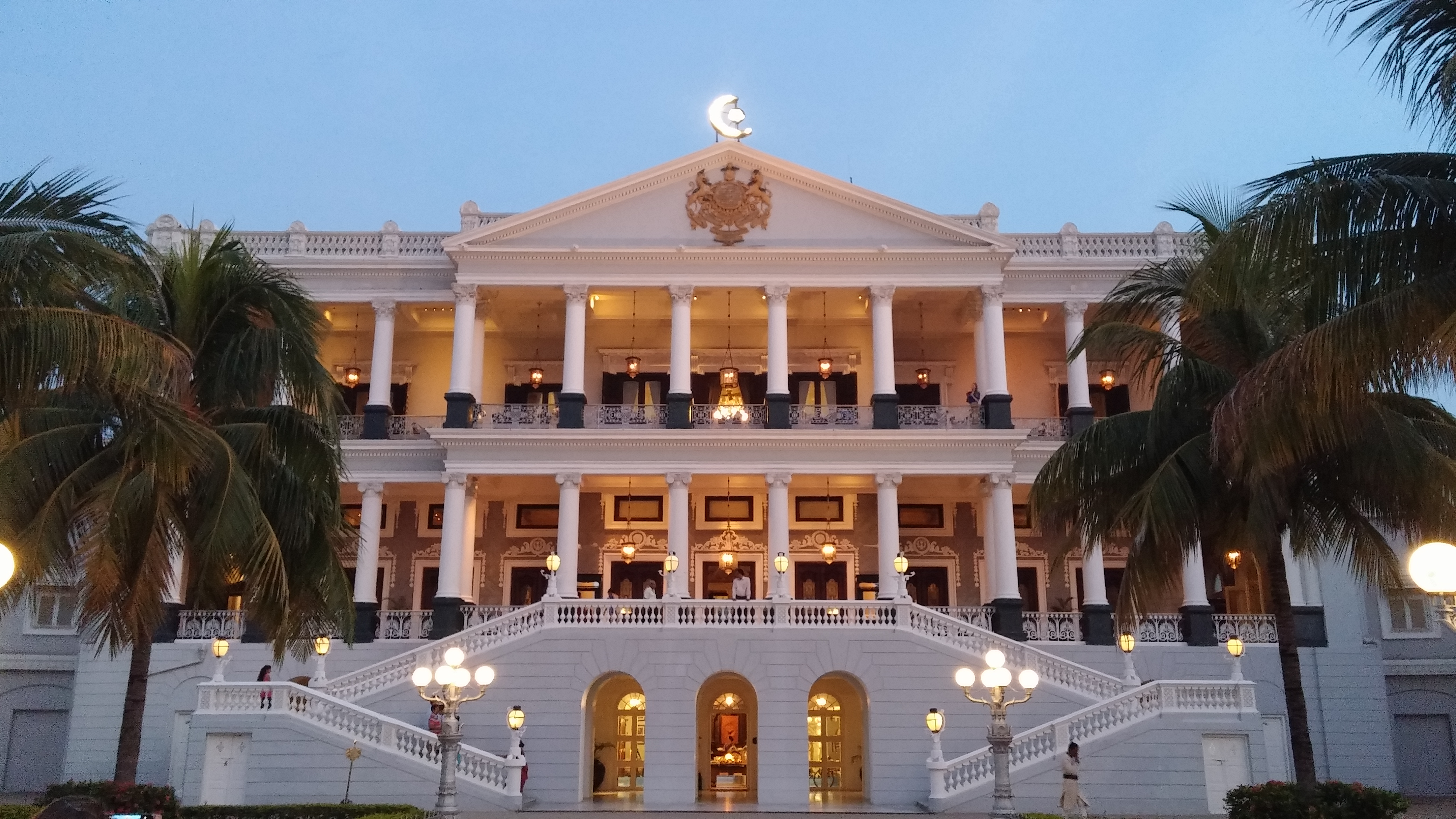 Falaknuma Palace